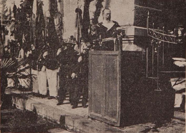 Bomberos de Santiago, inauguración de su mausoleo. Superintendente Valdes Vergara, leyendo un discurso (1904).